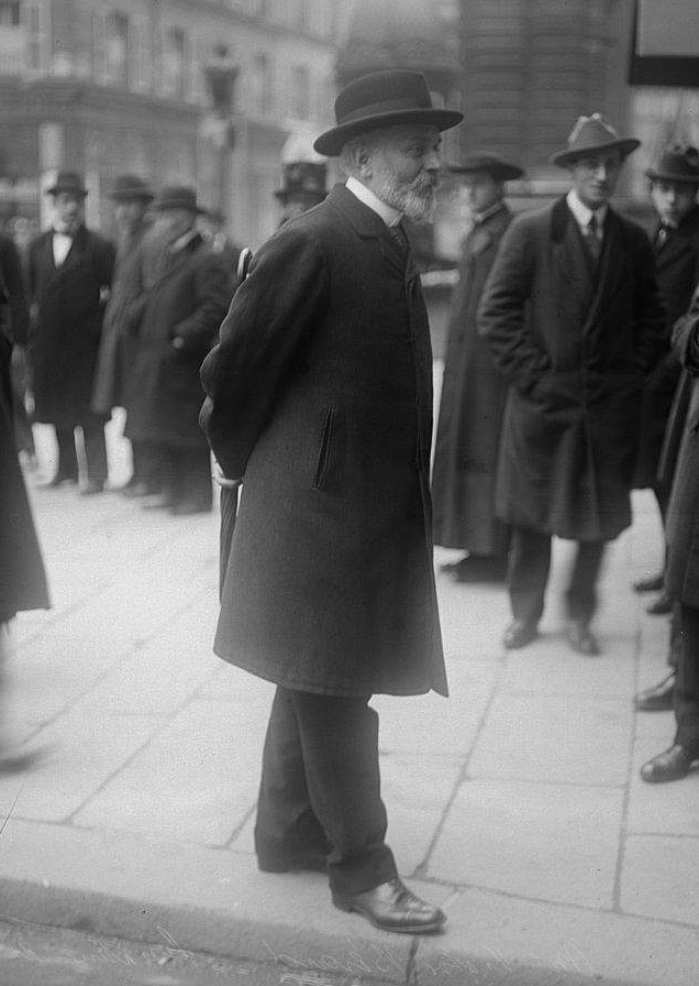 M. Victor Bérard, sénateur du Jura [devant l'entrée du Sénat] : [photographie de presse]